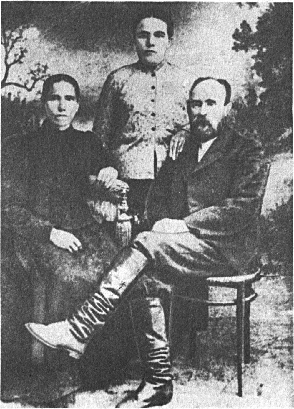 Налимов Семён Иванович (1857-1916) - мастер по изготовлению струнных русских народных музыкальных инструментов. На фото его жена (слева) и сестра.